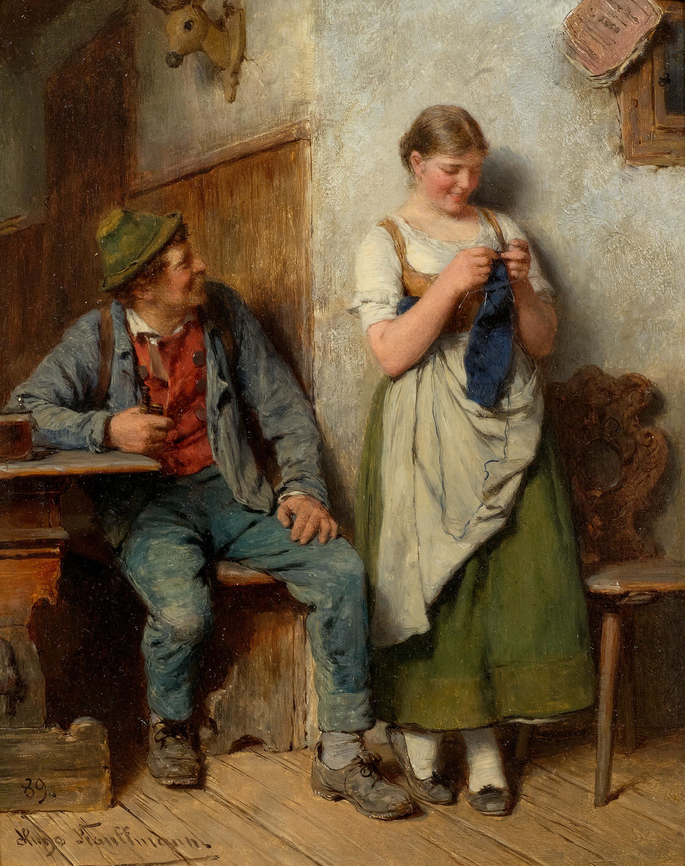 In der Stube mit Holzknecht und Mädel beim Stricken. Unten links datiert und signiert: 89 Hugo Kauffmann. Öl auf Holz. 18,5 x 15 cm. Werkverzeichnis Irmgard Holz Nr. 809